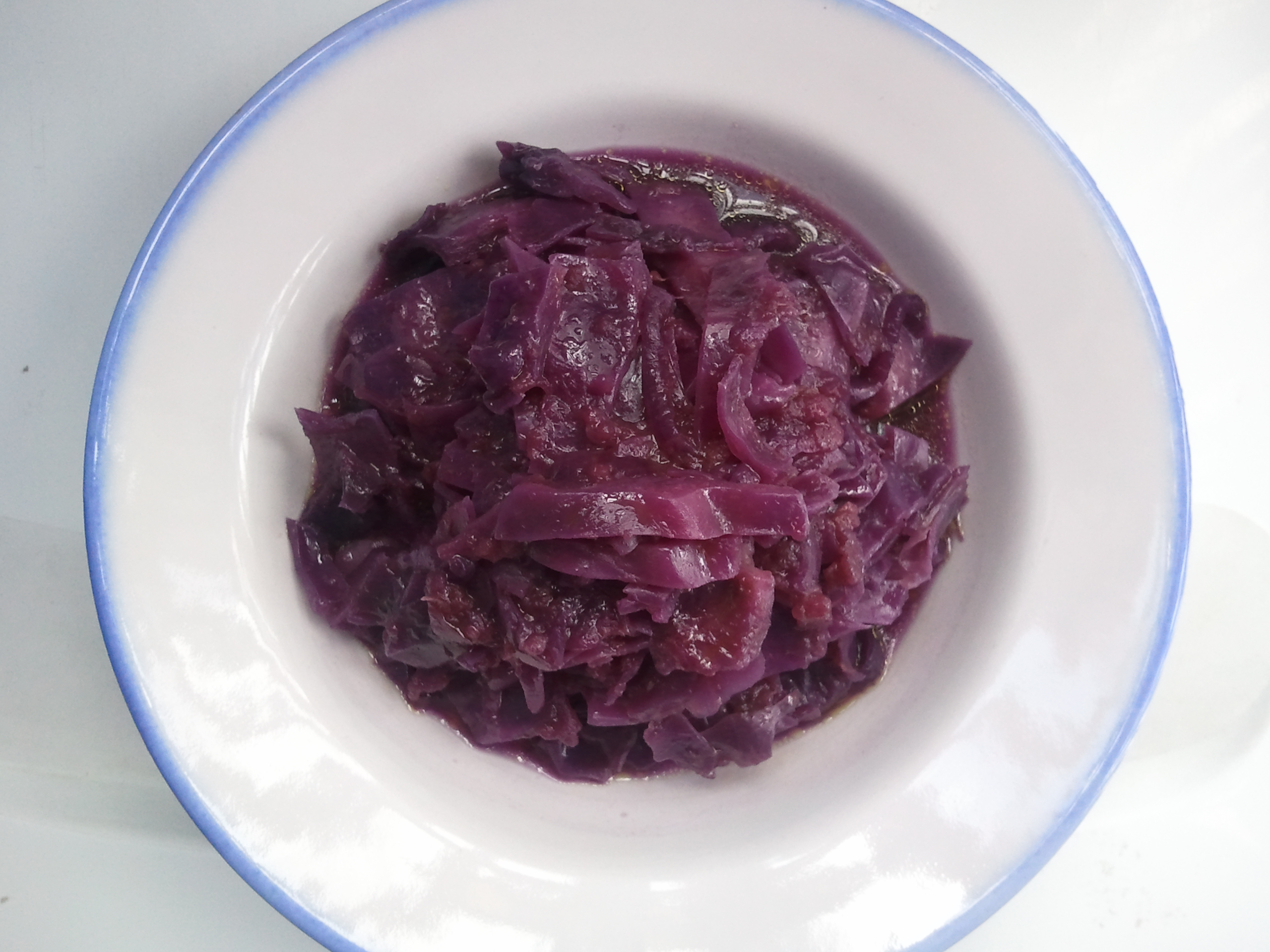 Lombarda con manzana, cebolla y aceite.